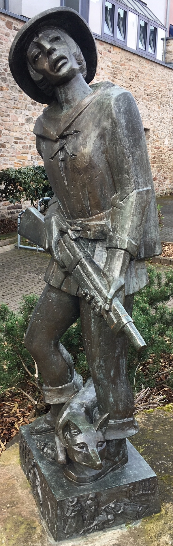 Der Wilddieb und Held von Bad Orb: Peter von Orb und sein Fuchs, nach Hans Prasch